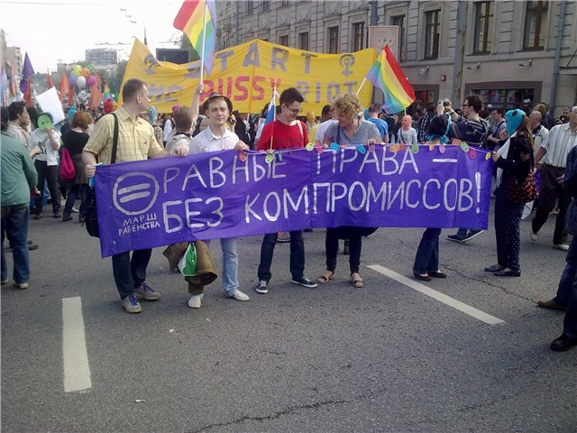 Колонна Марша равенства на общедемократическом шествии в Москве 6 мая 2012 года. Фотография первоначально была размещена на сайте levsd.ru